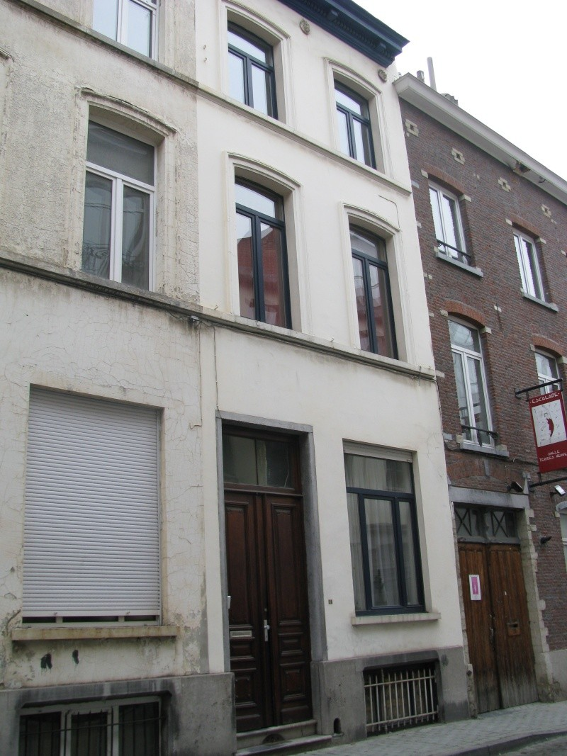 Bruxelles, rue de Terre-Neuve n° 26 alias rue du Labrador n° 26, domicile de Tintin. Avec l'autorisation de Halambique.